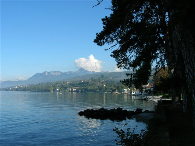 Baie d'Amphion vue du parc des cèdres